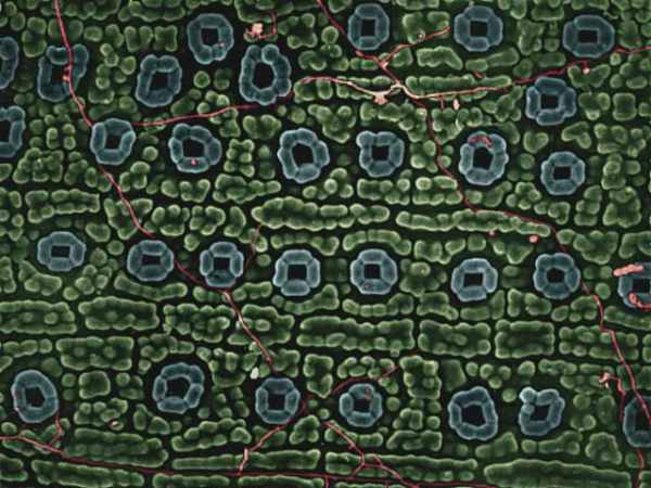 estomas